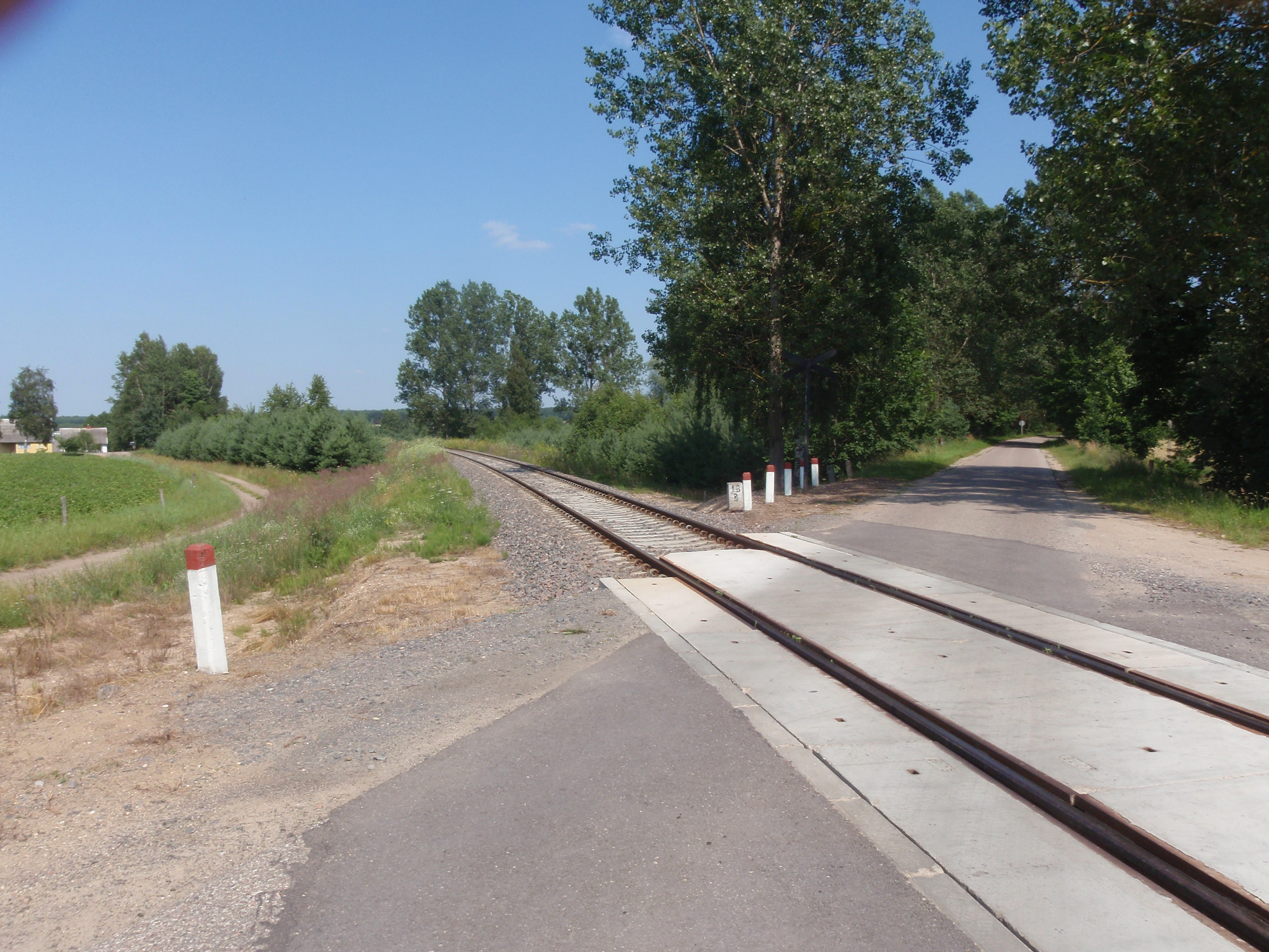 zachodni przejazd kolejowy przez linię kolejową nr 59 koło wsi Zabłotczyzna